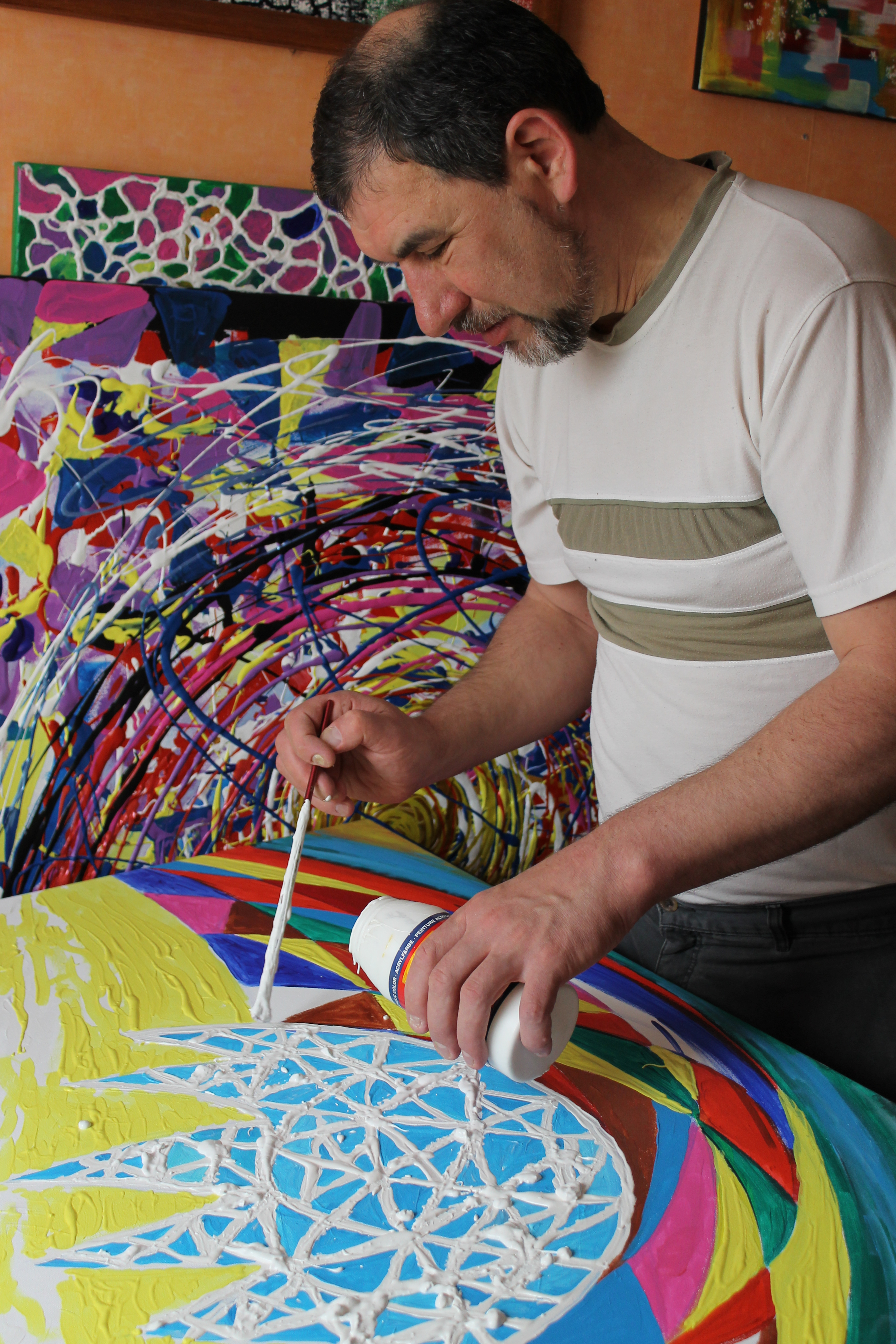 я за роботою